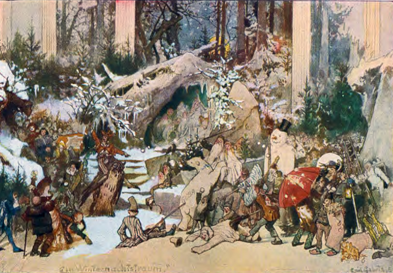 Carl Gehrts Entwurf für Redoute Ein Winternachtstraum zur Redoute des Künstlerverein Malkasten am 11. Februar 1888